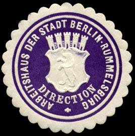 Sealing stamp Title: Arbeitshaus der Stadt Berlin - Rummelsburg - Direction Description: violett, weiß, geprägt Place: Berlin size: 4 cm